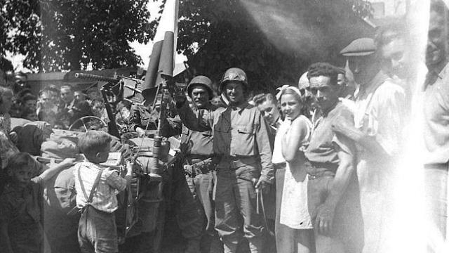 Une des rares images prises lors de la libération de Vibraye, le 13 août 1944, par Felix Girault.